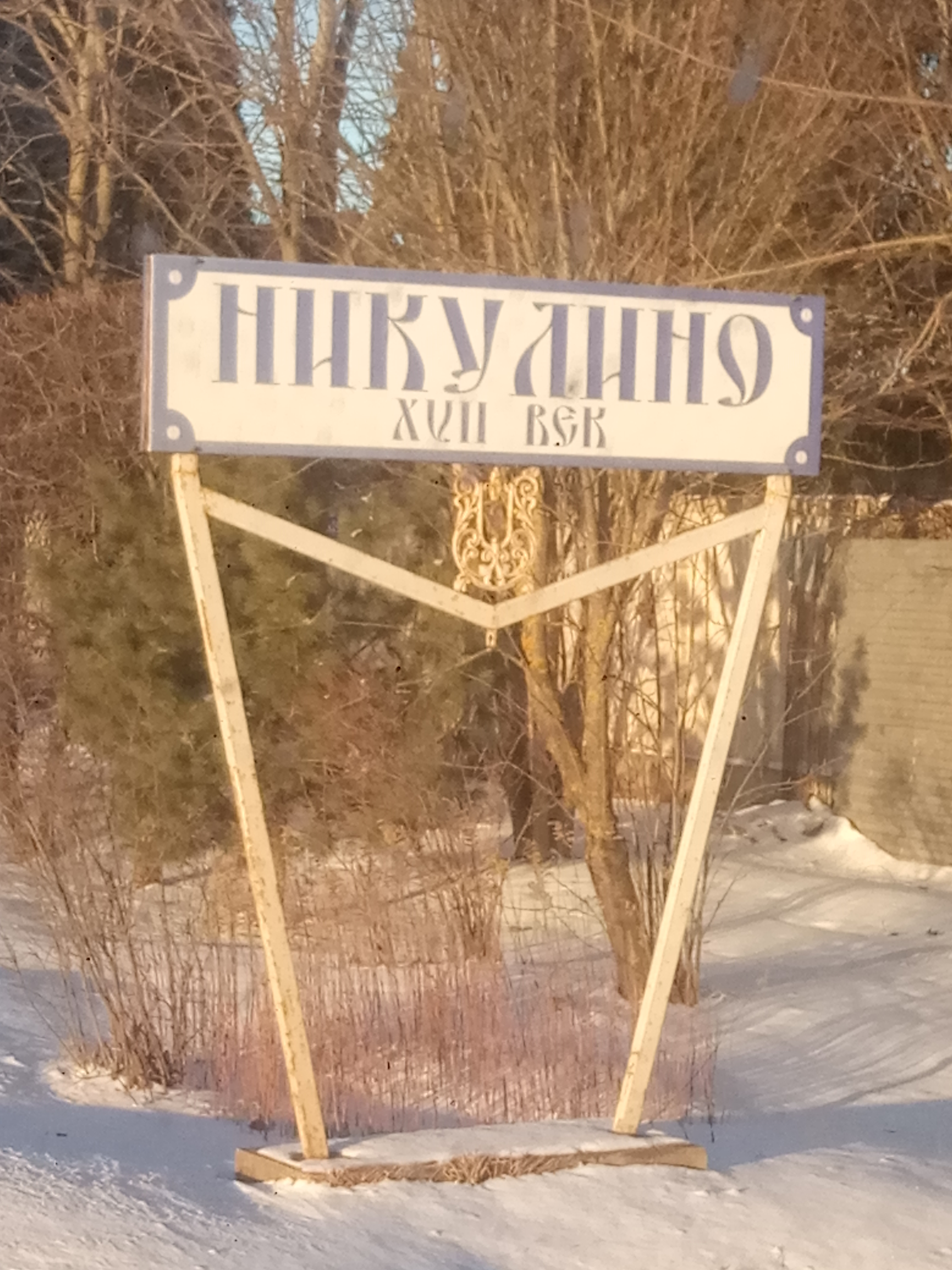 Никулино